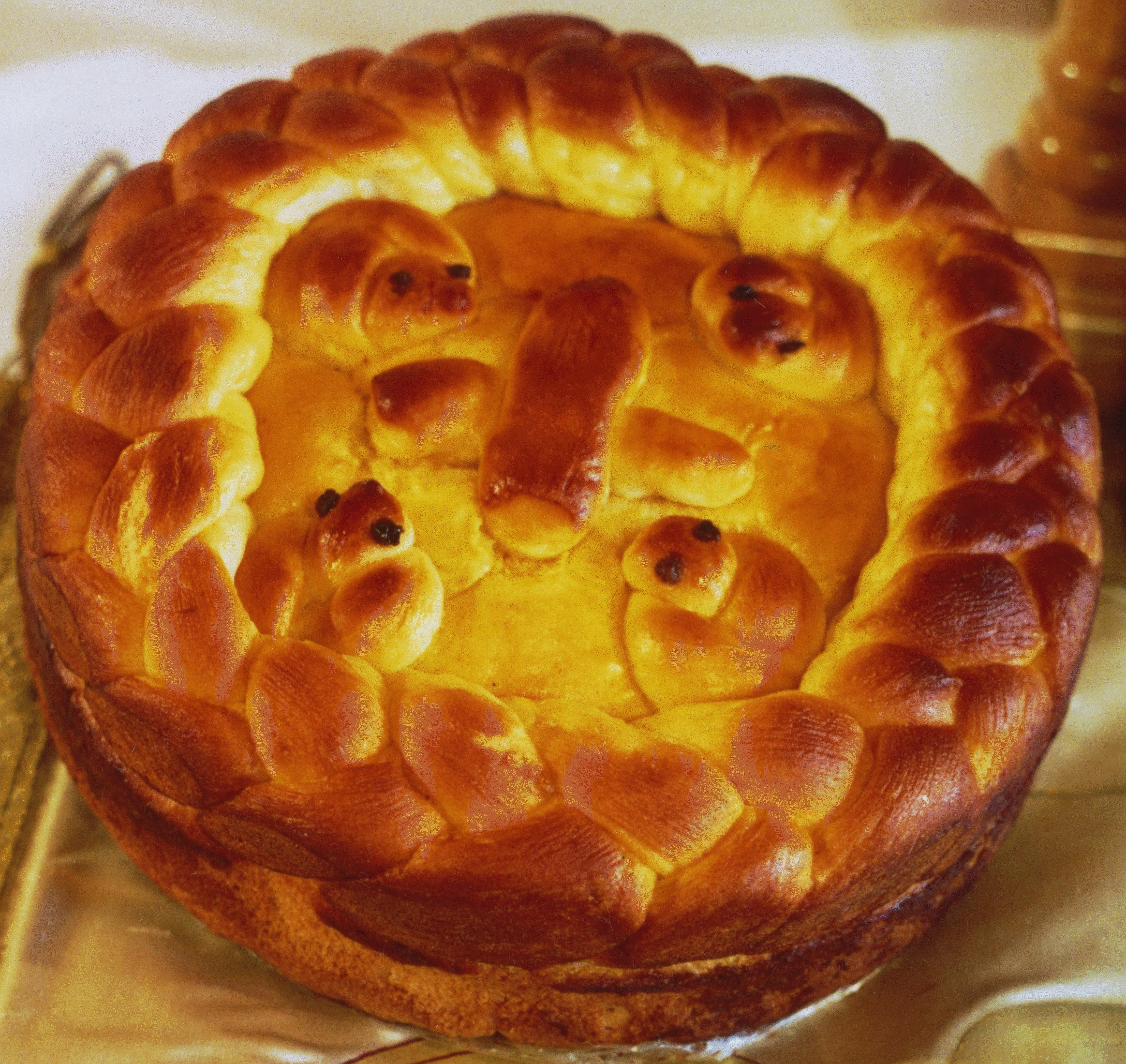 Артос из Закарпатья - Пряшов. Photo taken by Jozafát Vladimír Timkovič, OSBM